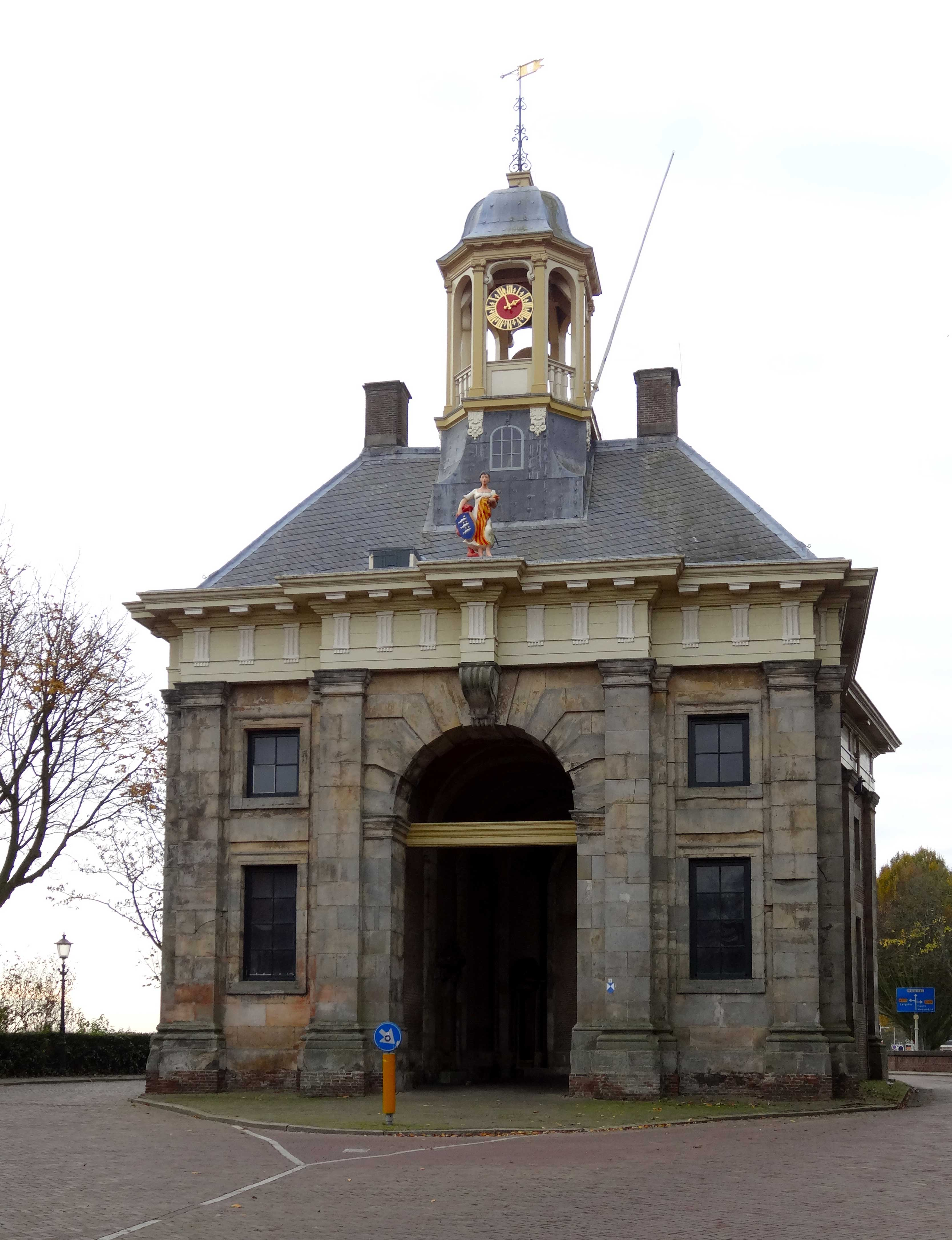 Koepoort of Westerpoort in Enkhuizen gezien vanaf de stadszijde, oostzijde